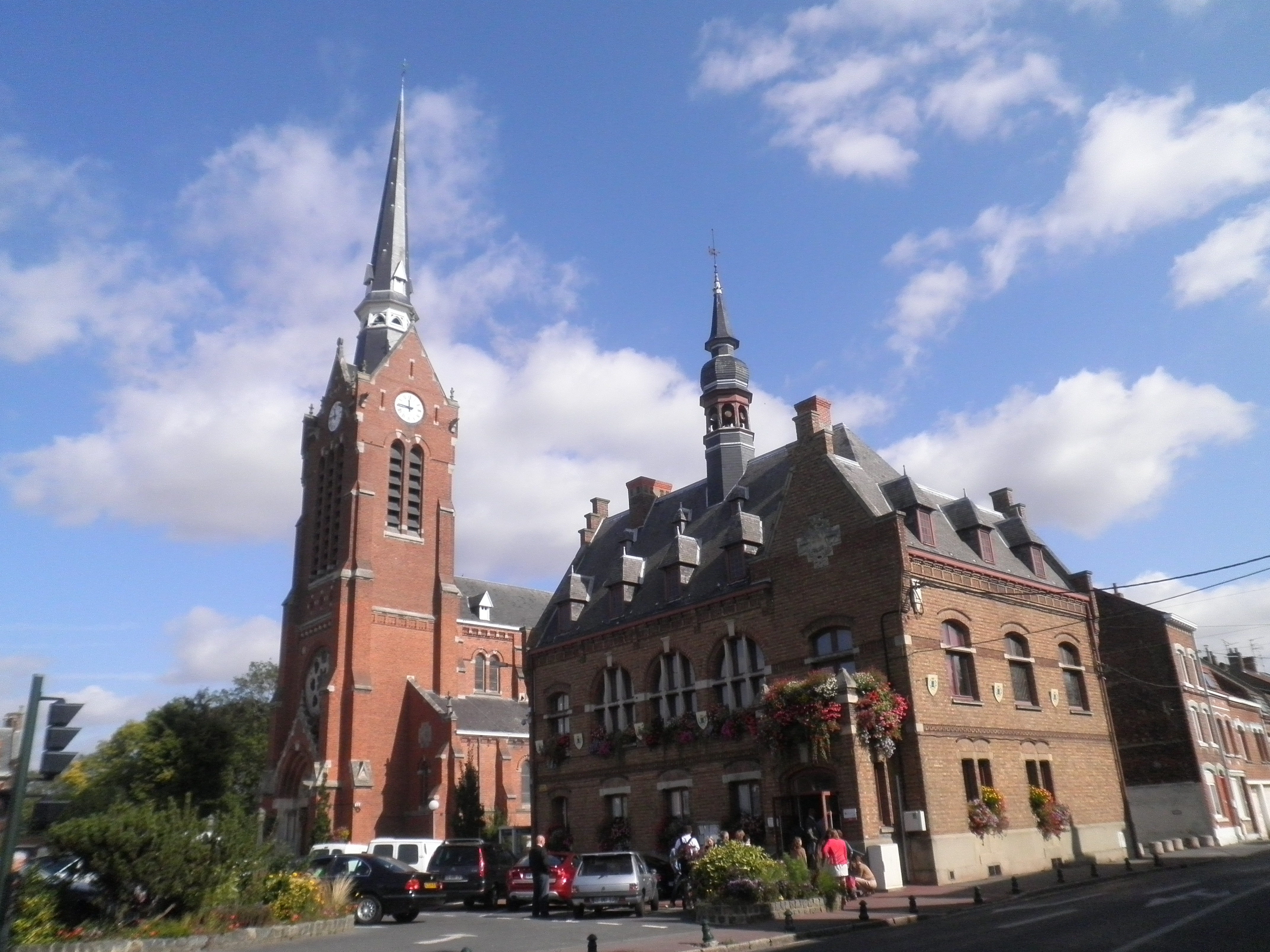 Laventie, Place du 8 mai. À gauche, l'église Saint-Vaast, à droite, l'Hôtel de Ville.